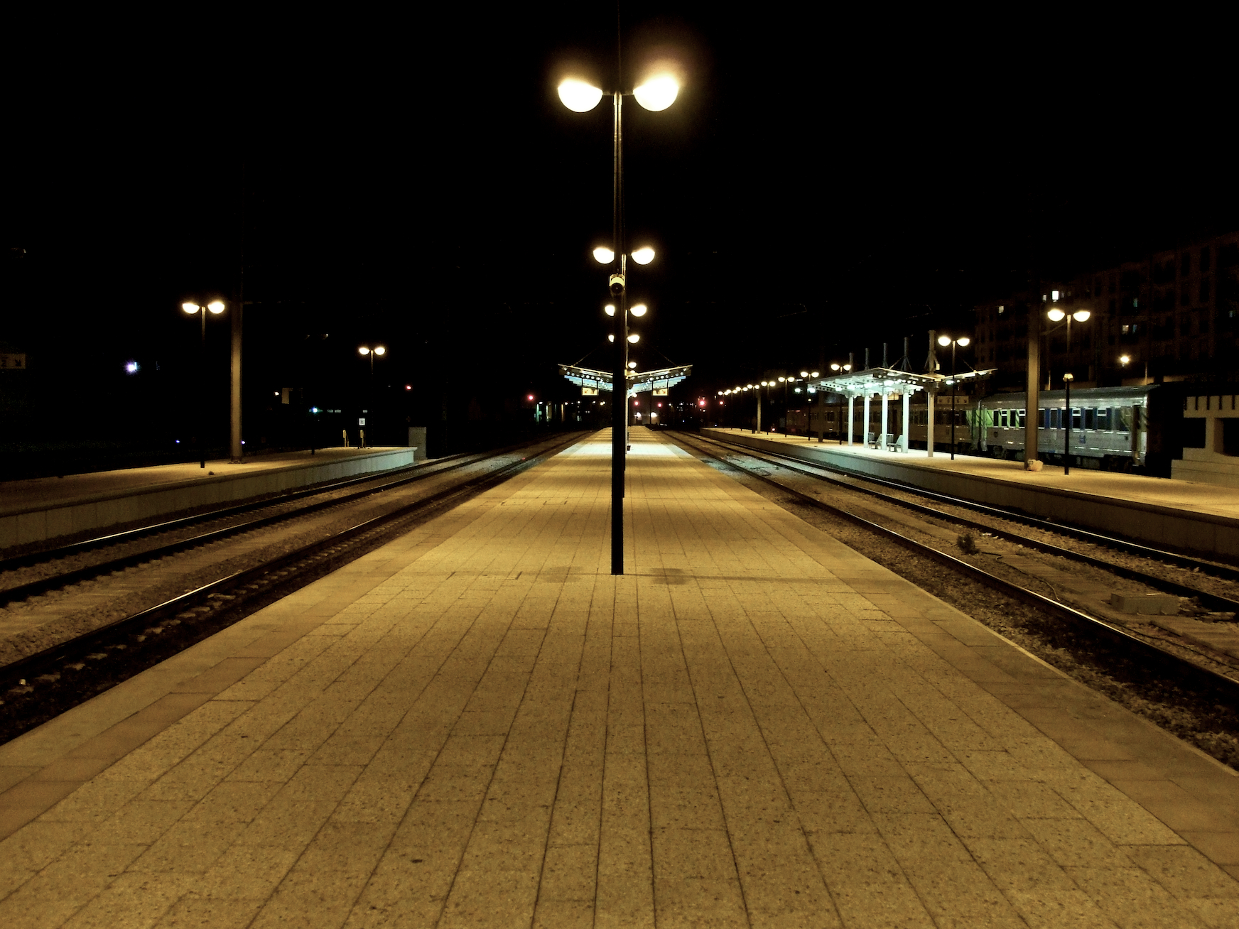 Tipo: EP (Estação) Local: Faro [Linha do Algarve, PK 340] Data e hora: 20 de Fevereiro de 2009 [21h03]